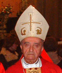 Ignazio Cannavò a Francavilla di Sicilia(ME).